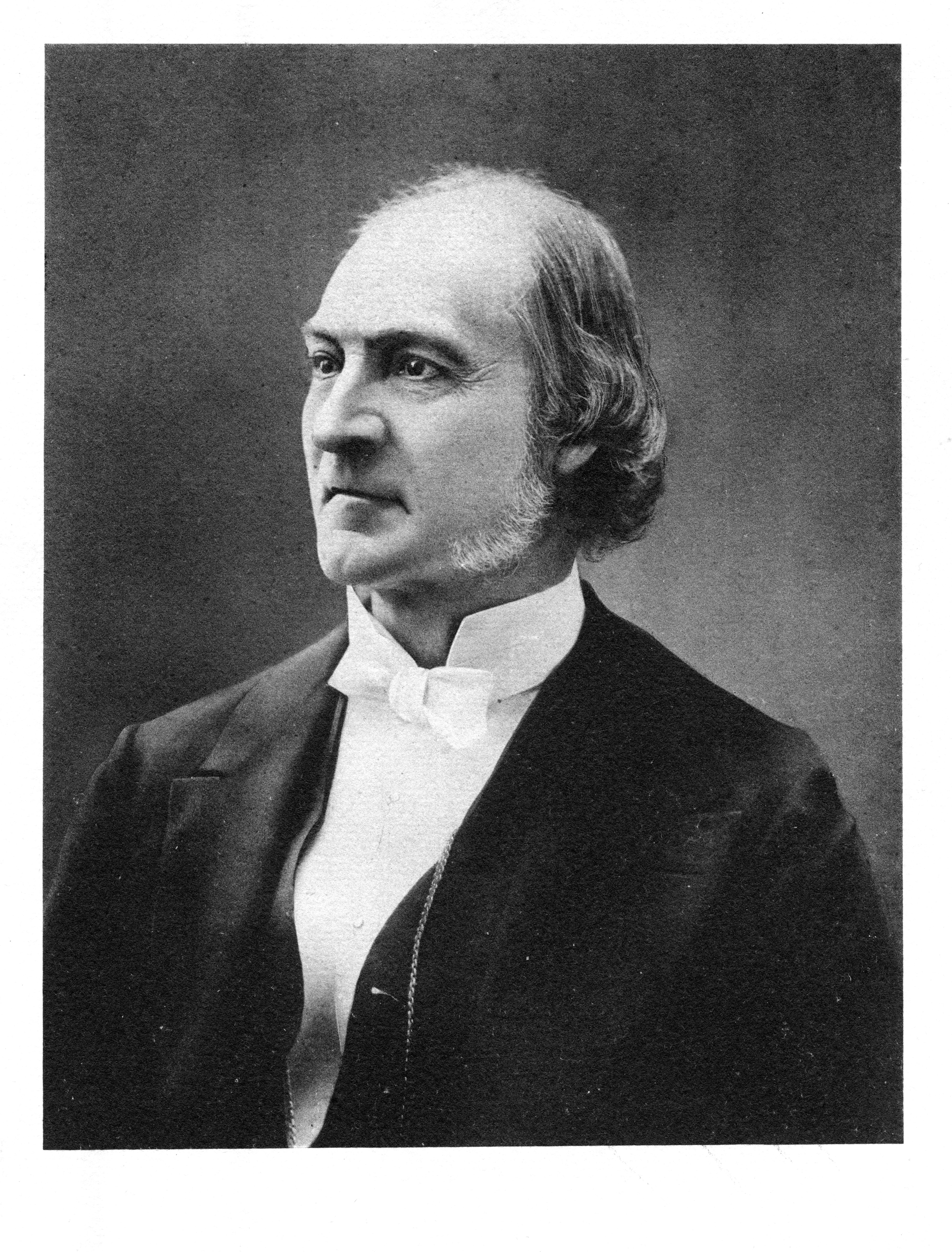 portrait